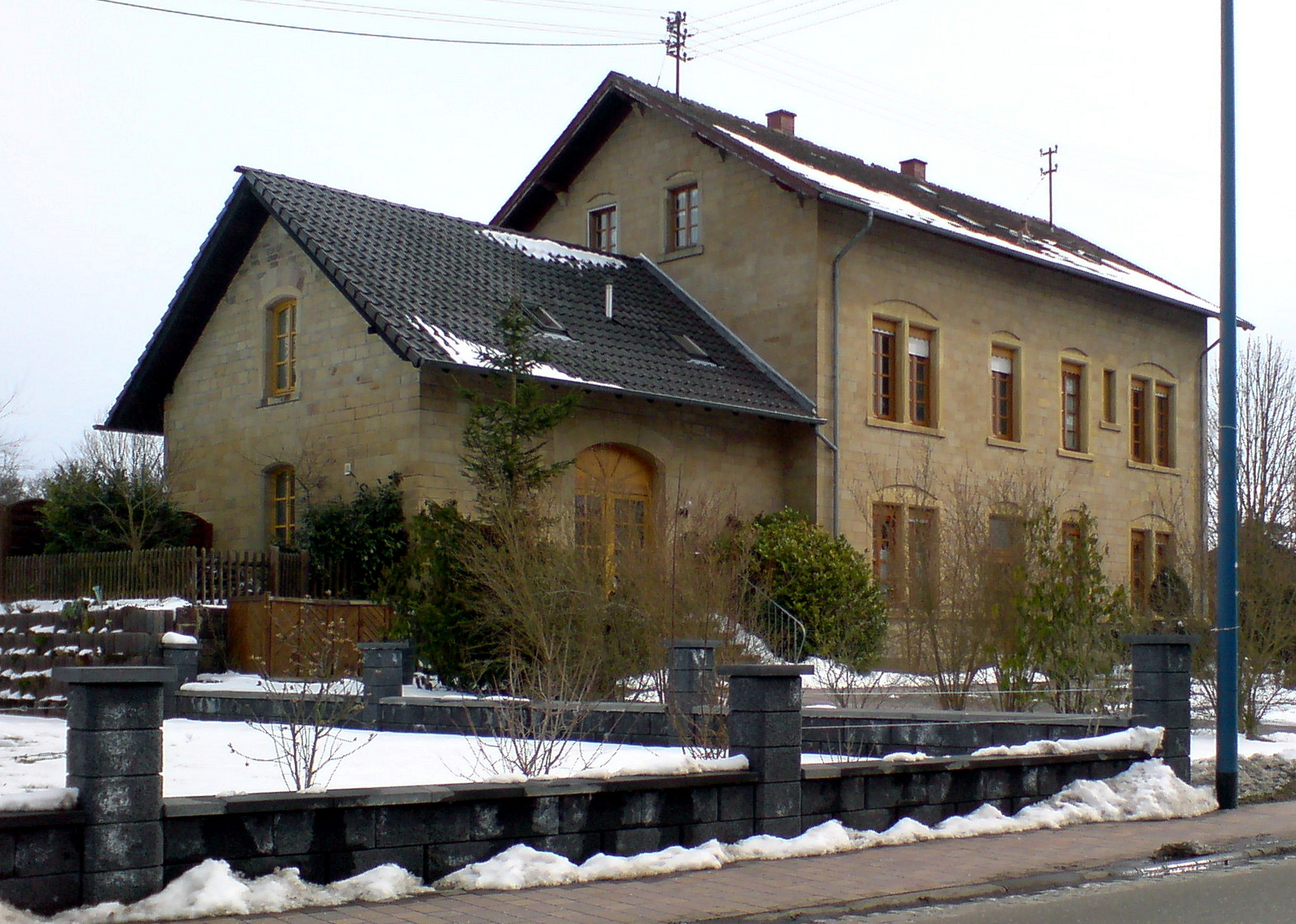 Der Bahnhof Niedereisenbach-Hachenbach (Glanbrücken) an der ehemaligen Glantalbahn.